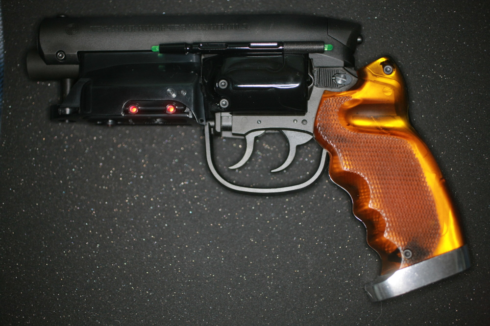 留之助商店製作のデッカードブラスターです。